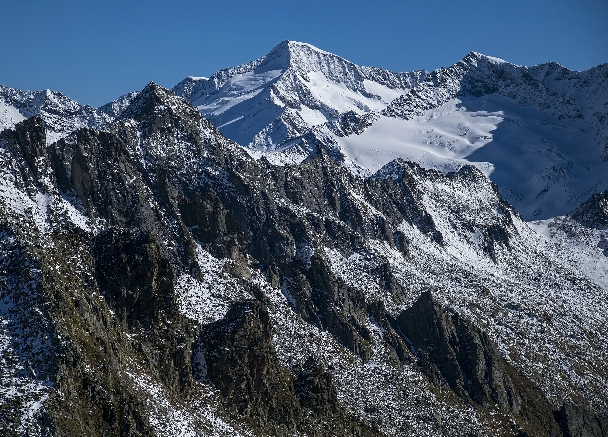 Parco naturale Vedrette di Ries-Aurina (Q1970634)